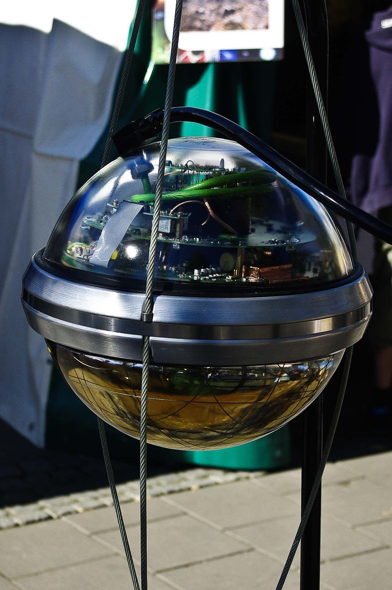 IceCube neutriino teleskoobi detektor (DOM)